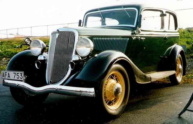 Ford Model 40 700 De Luxe Tudor Sedan 1934